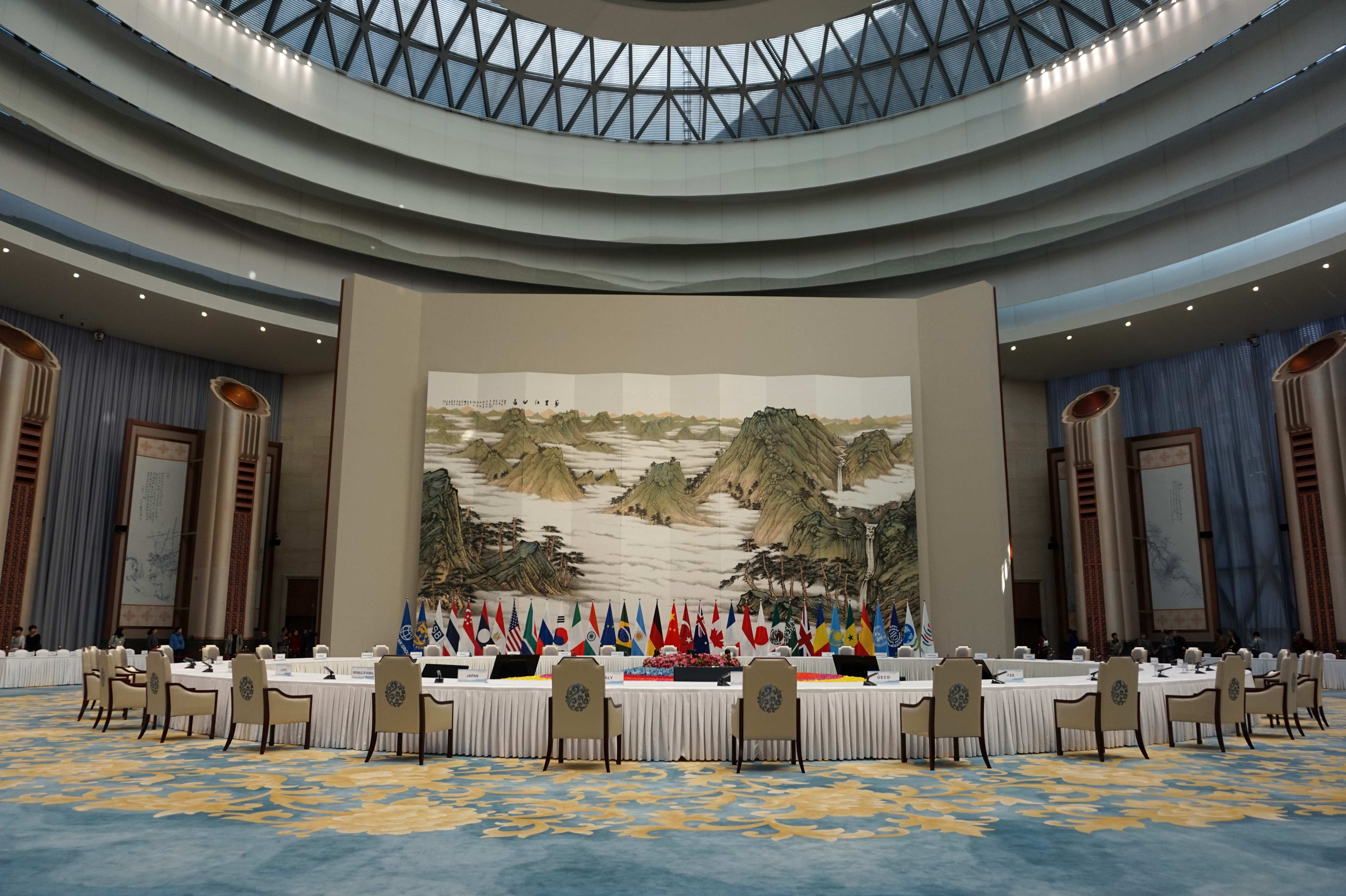 杭州国际博览中心宴会厅。